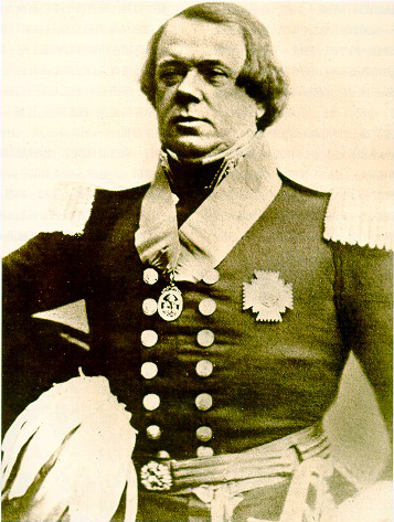 The image here is claimed to be Public Domain as it is: A portrait of one of Hong Kong's most famous politicians; The image used is of a ceremonial and not a commerical value; The article is greatly improved by the prominence of this photo; Which is hosted and displayed on the not-for-profit Wikipedia Encylopedia for educational purposes. The person in the photo died in 1863 and therefore the copyright has expired. { }